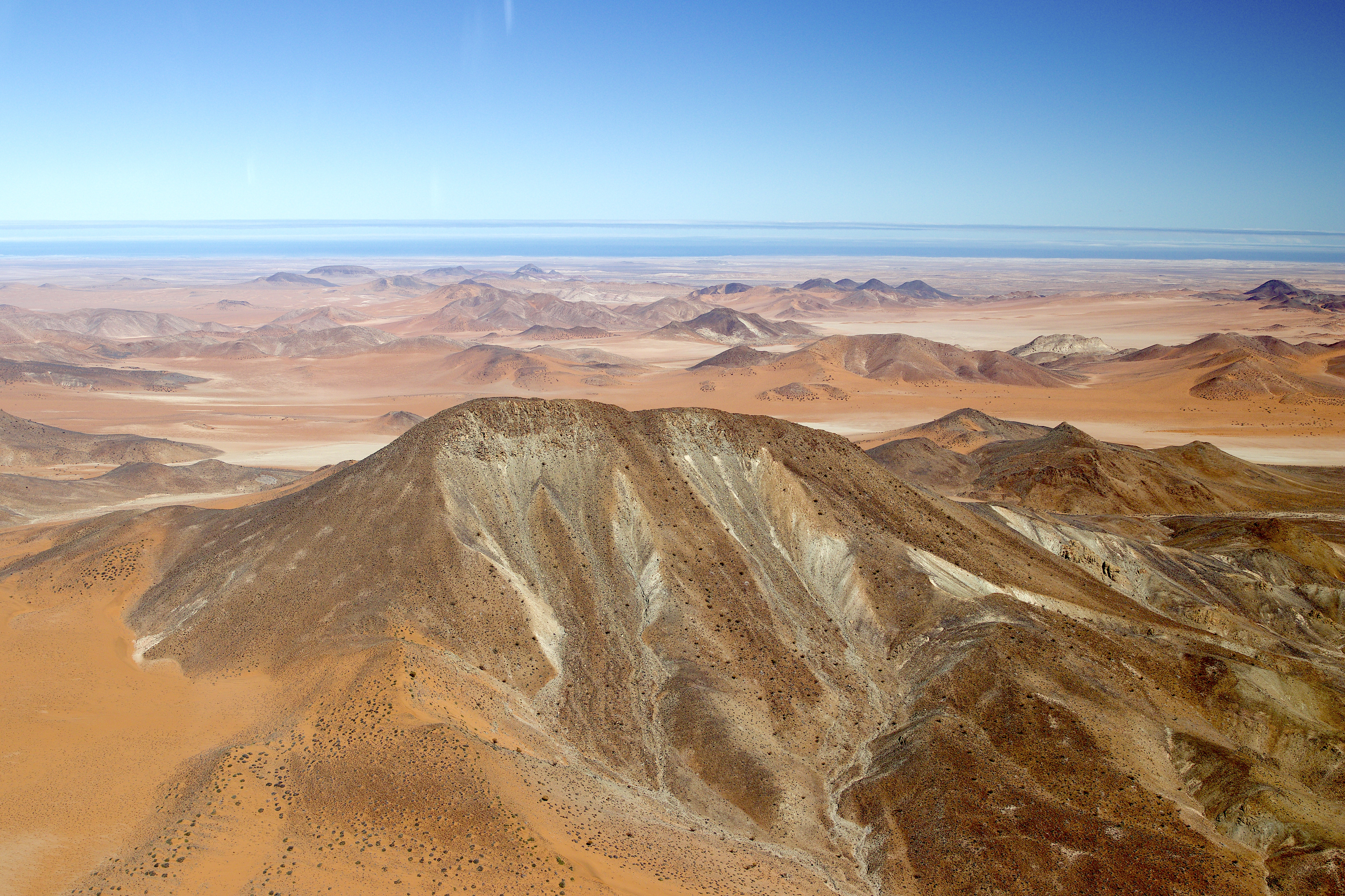 Höchster, im Hintergrund die Klinghardtberge. Luftaufnahme 2018